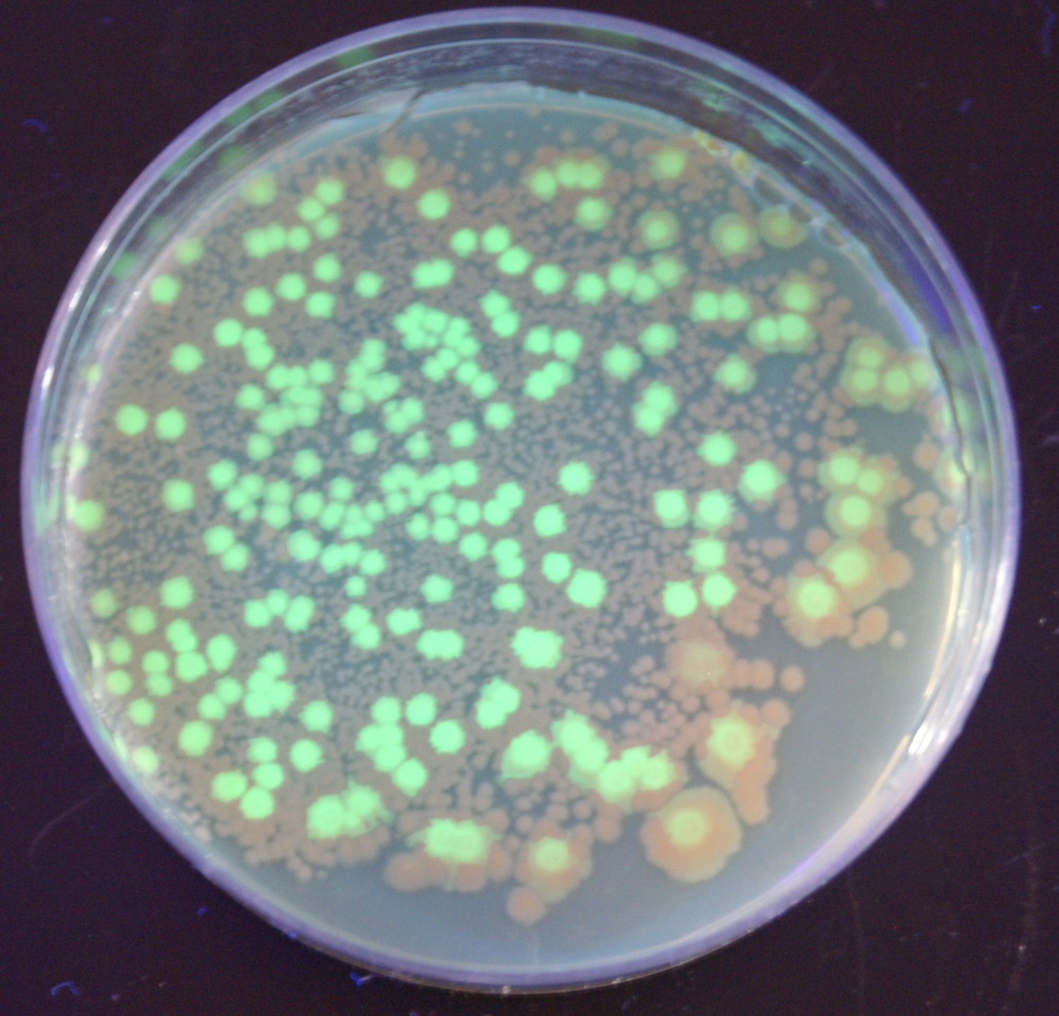 PGLO visualized under ultraviolet light